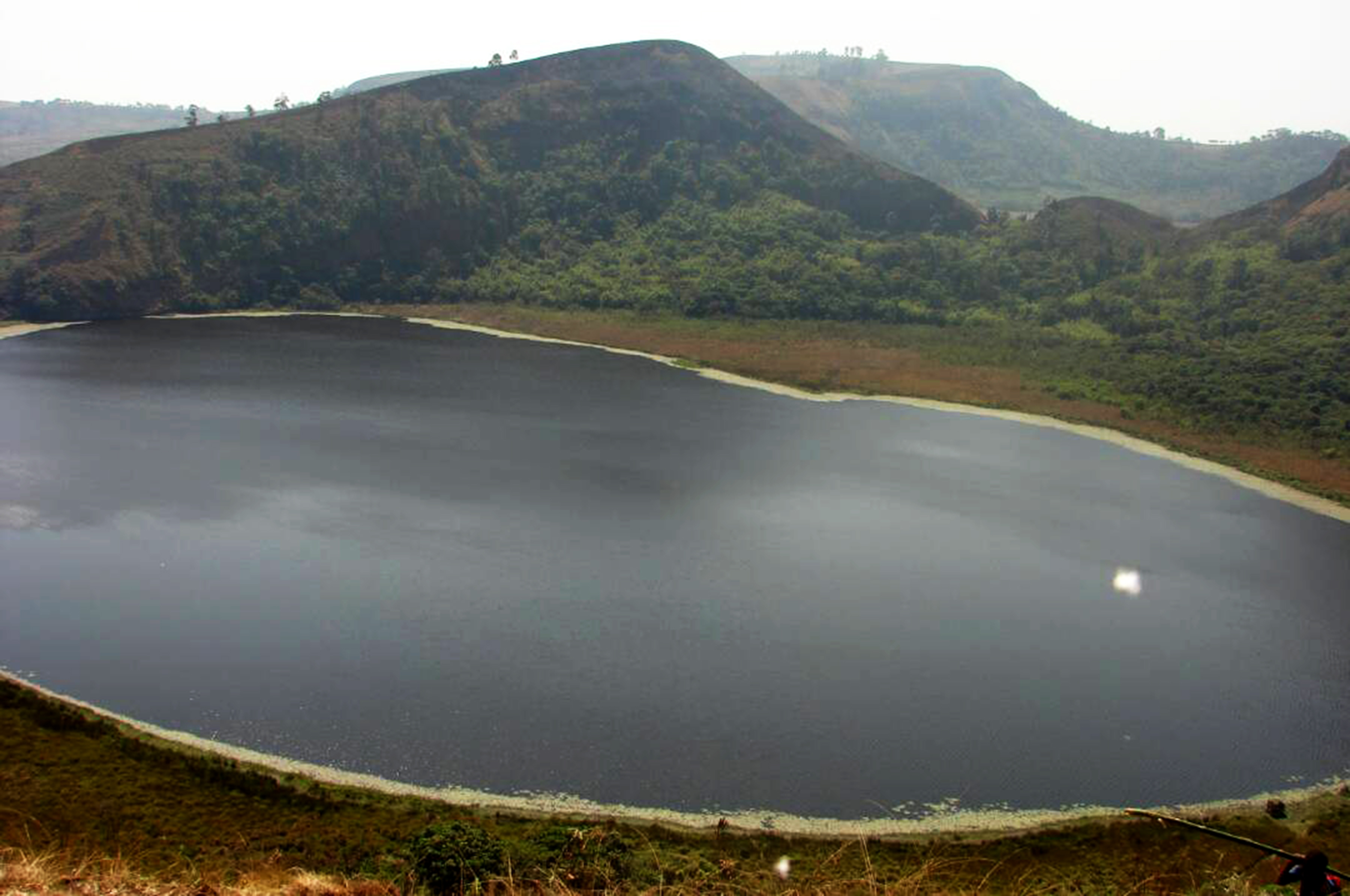 Lake Bambili North West